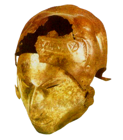 MarcaraHuancavilca